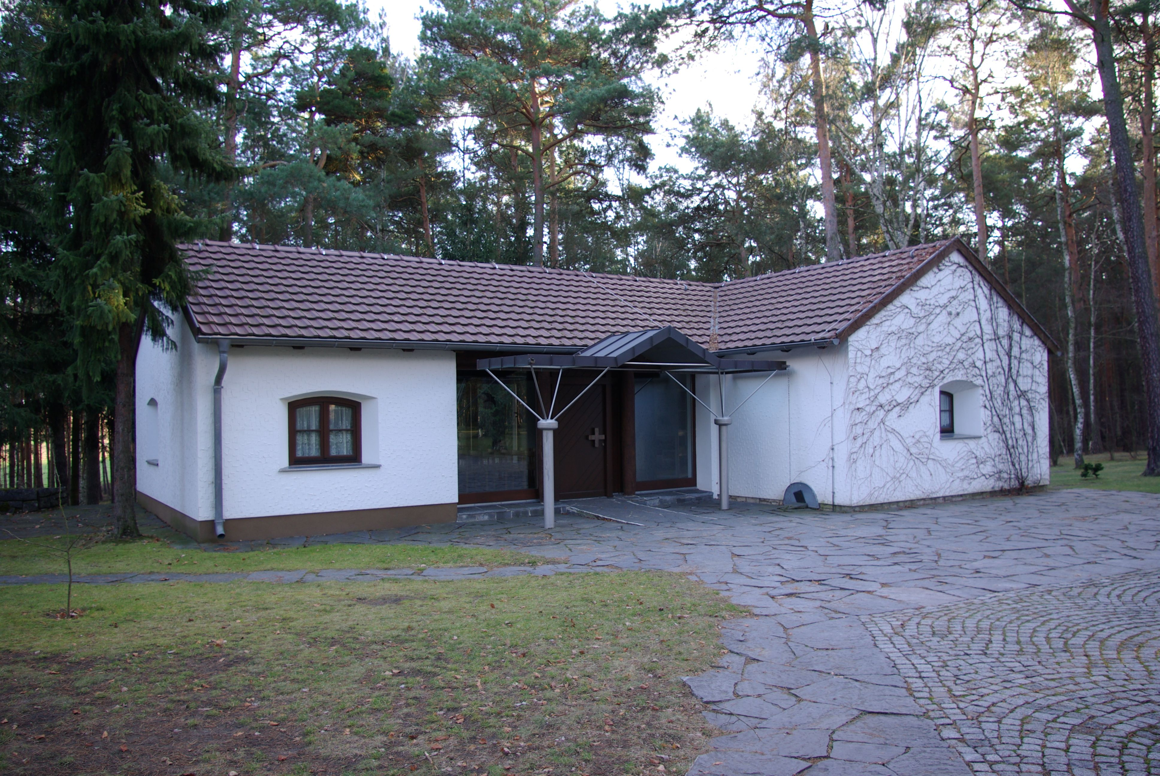 Waldfriedhof Halbe, Brandenburg, Deutschland, der Gedenkraum